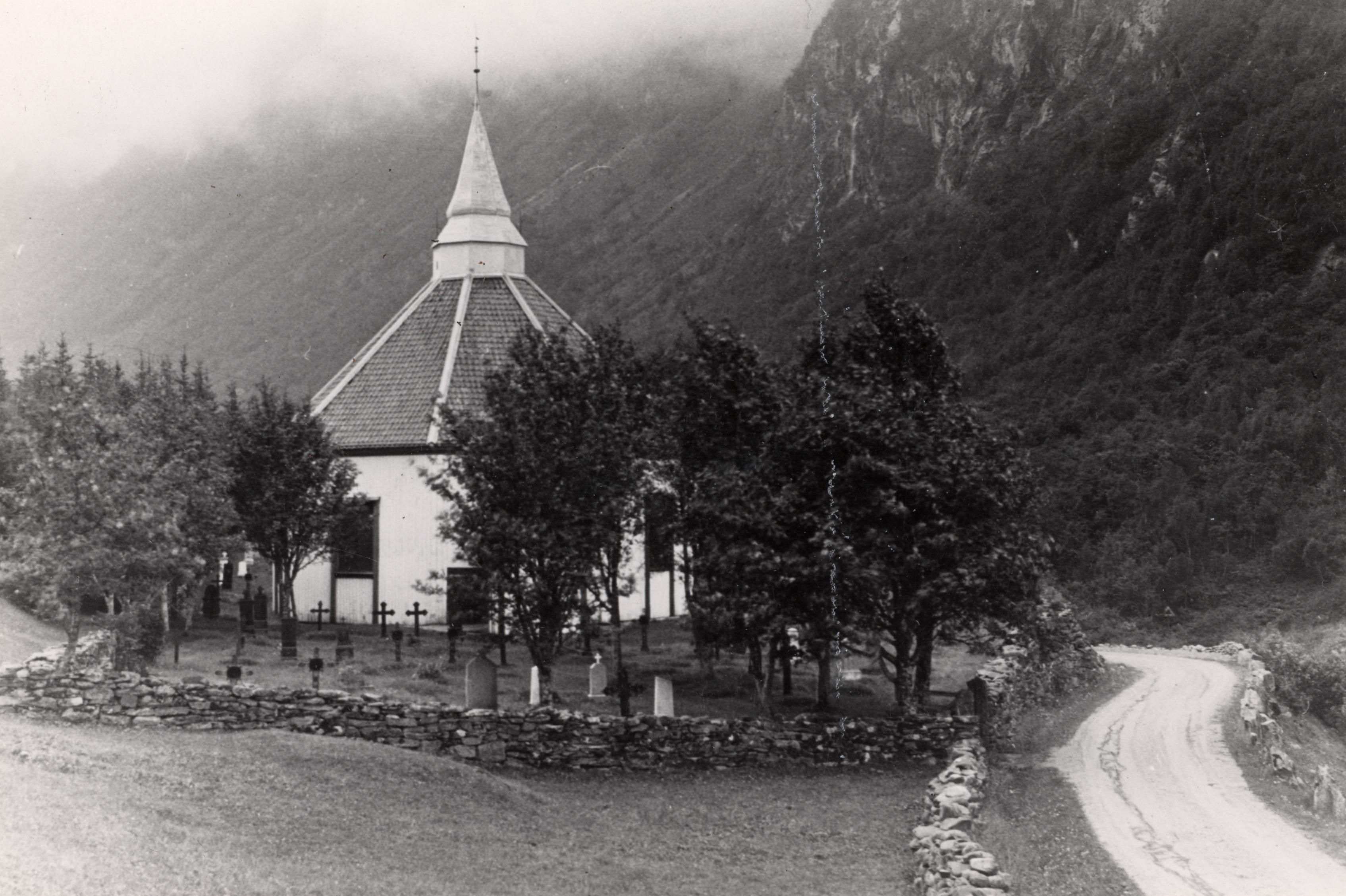 Romfo kirke i Romfo, Møre og Romsdal